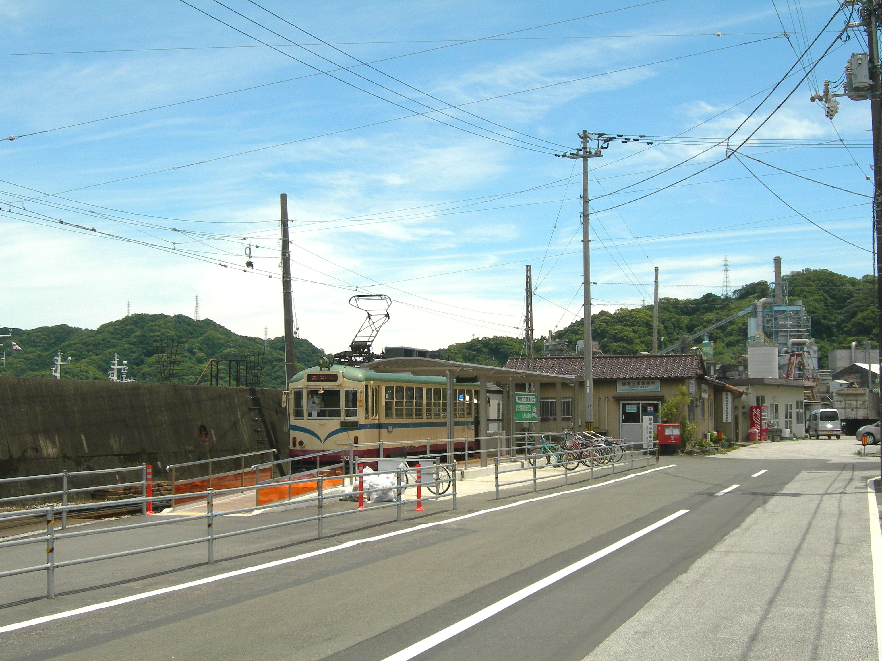 土佐電気鉄道・桟橋通5丁目電停